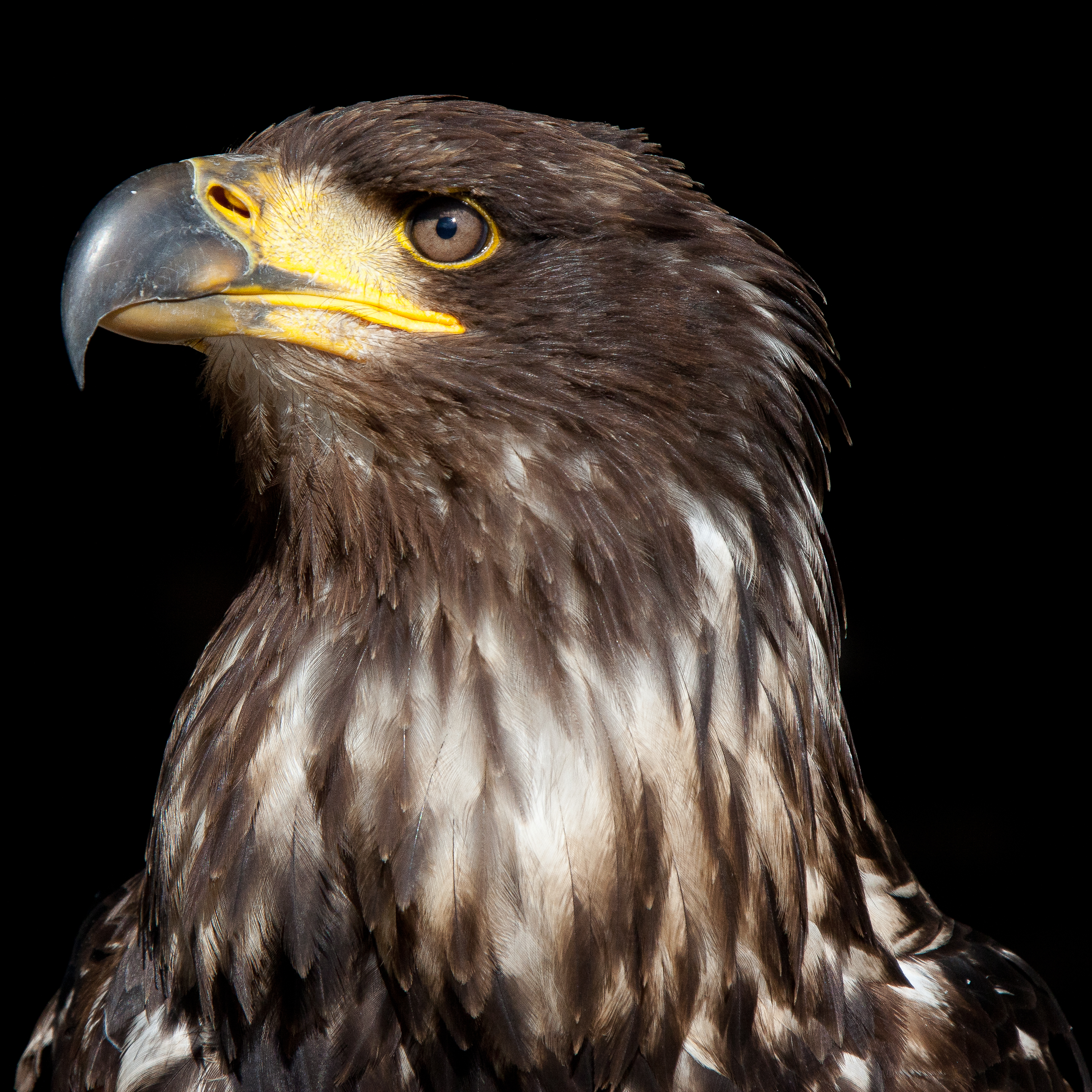 Immaturer Seeadler, der vom zweiten ins dritte Gefieder wechselt